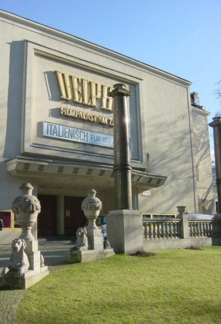 Außenansicht des DELPHI Filmpalastes, Kantstraße 12a, 10623 Berlin